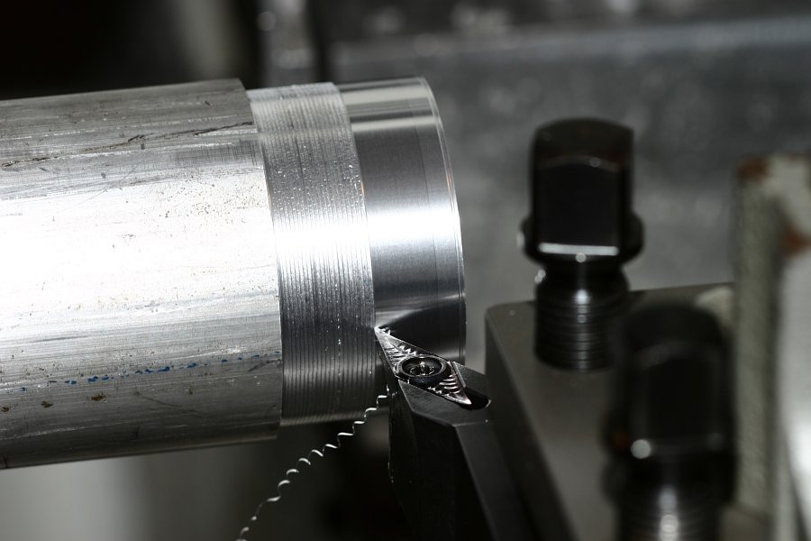 Schlichtbearbeitung beim Drehen von Aluminium